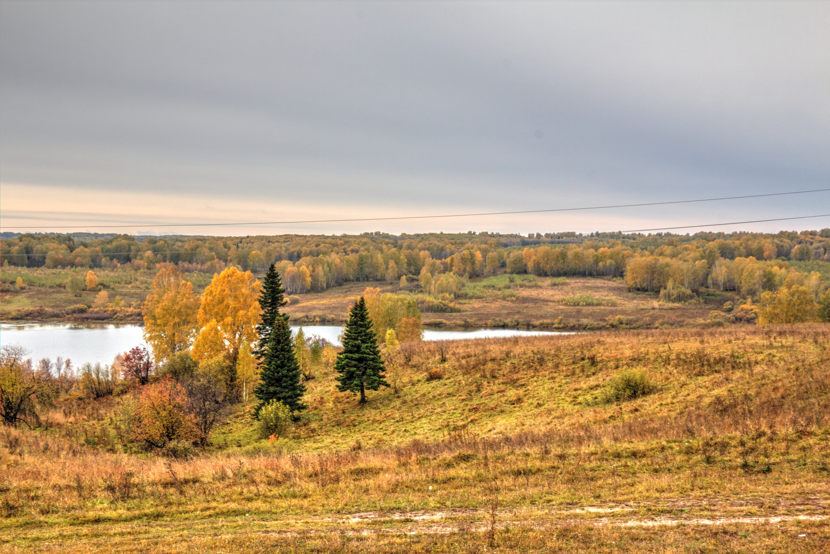 Осень в Ельцовском районе Алтайского края